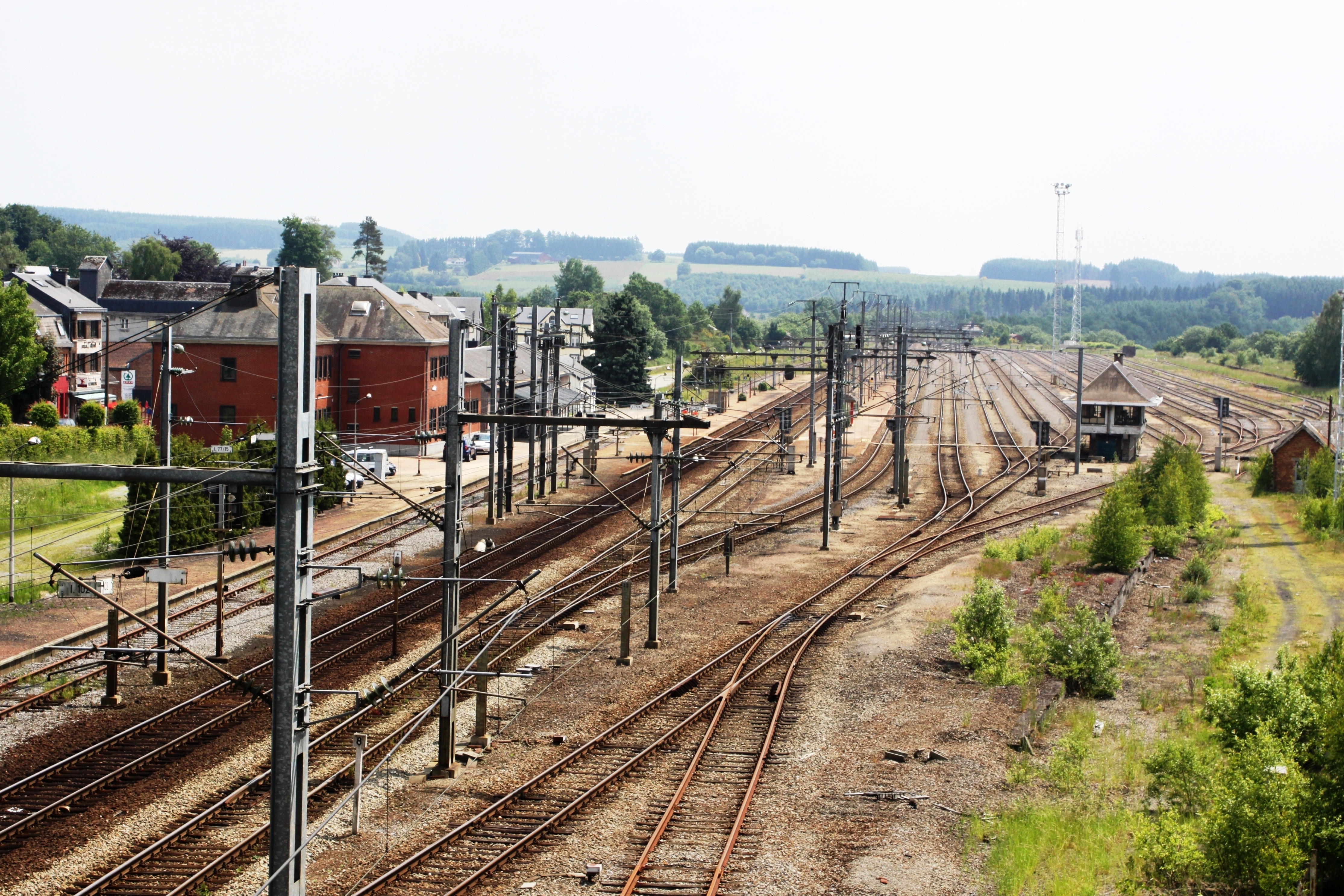 Vue sur la Gare de Gouvy depuis le pont routier.